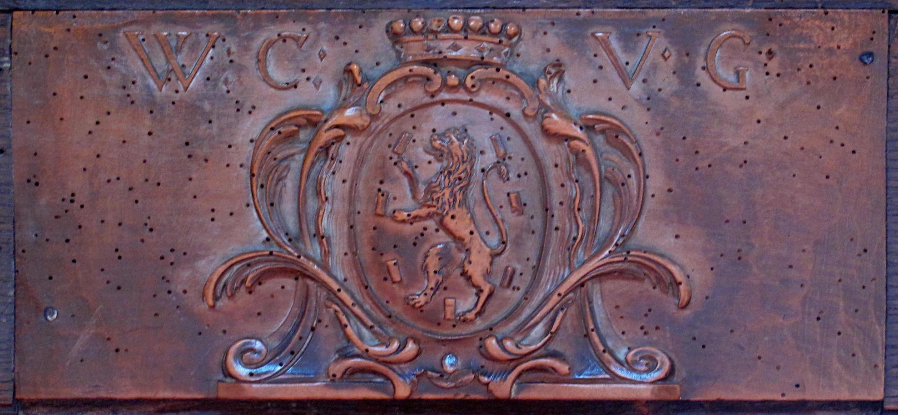 Münster Bern, Diesbach-Kapelle, Kirchenortschild Gingins